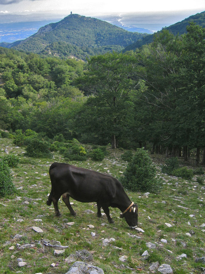 Une vache Massanaise de la race Albera et la Tour de la Massane en arrière plan